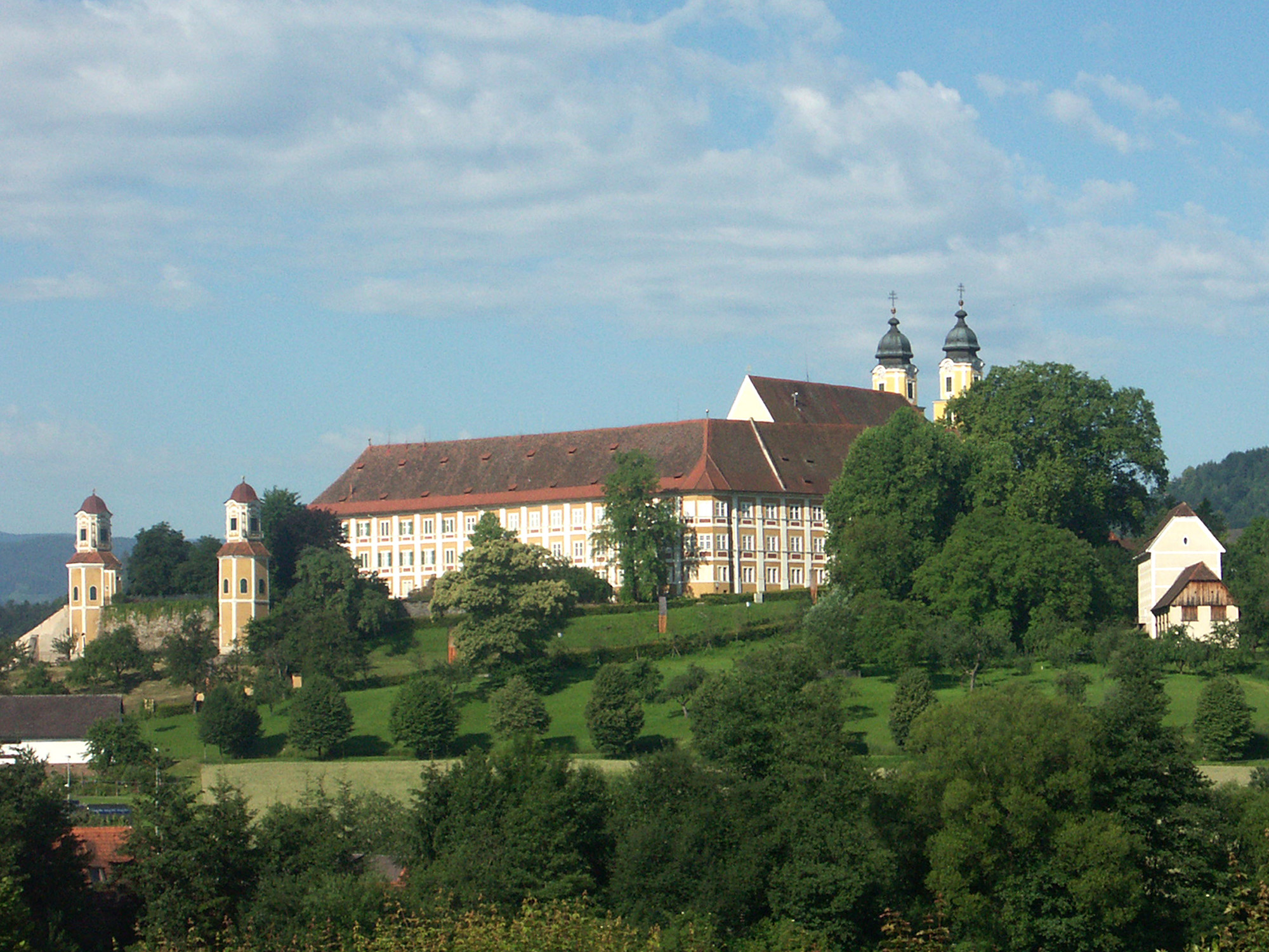 Schloss Stainz